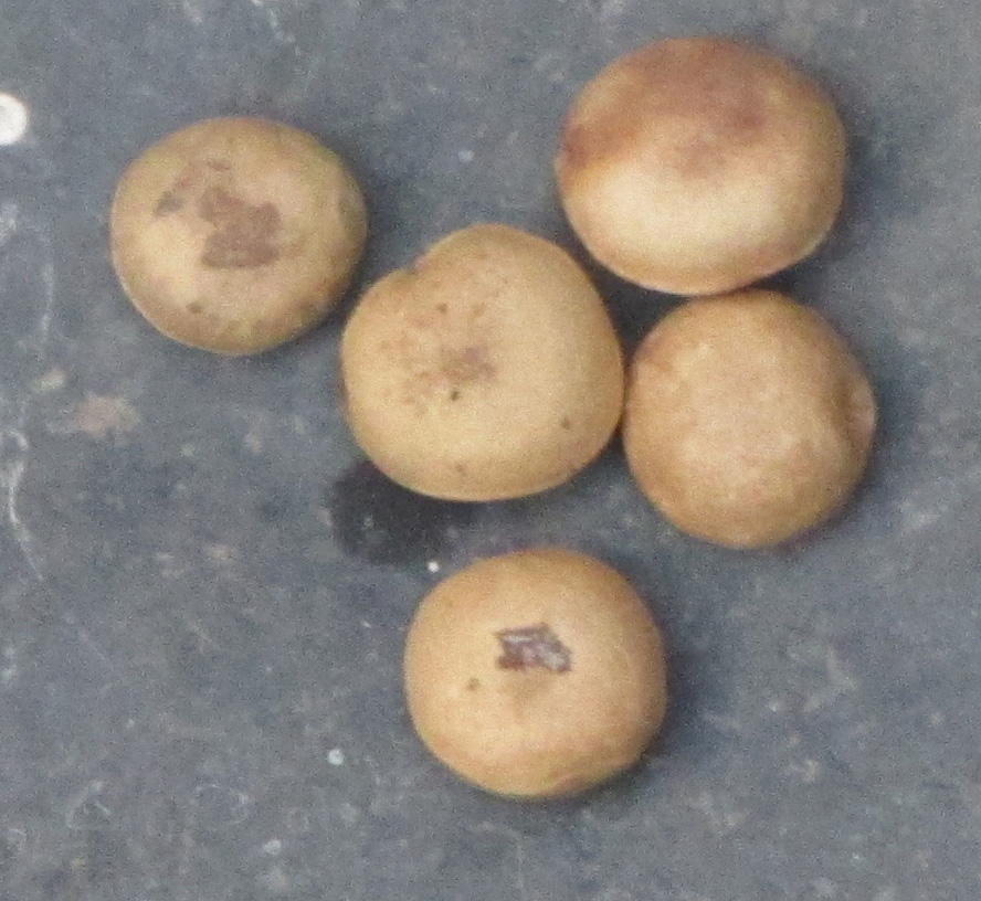 தேத்தாங்கொட்டை. இது கலங்கல் நீரைத் தெளியவைக்கவும், நகைகளில் உள்ள அழுக்கை நீக்கவும் பயன்படும். எனது படம்.